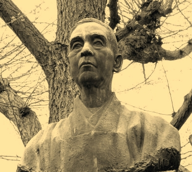 Okazaki Kunisuke, bronze bust in Wakayama city, Japan